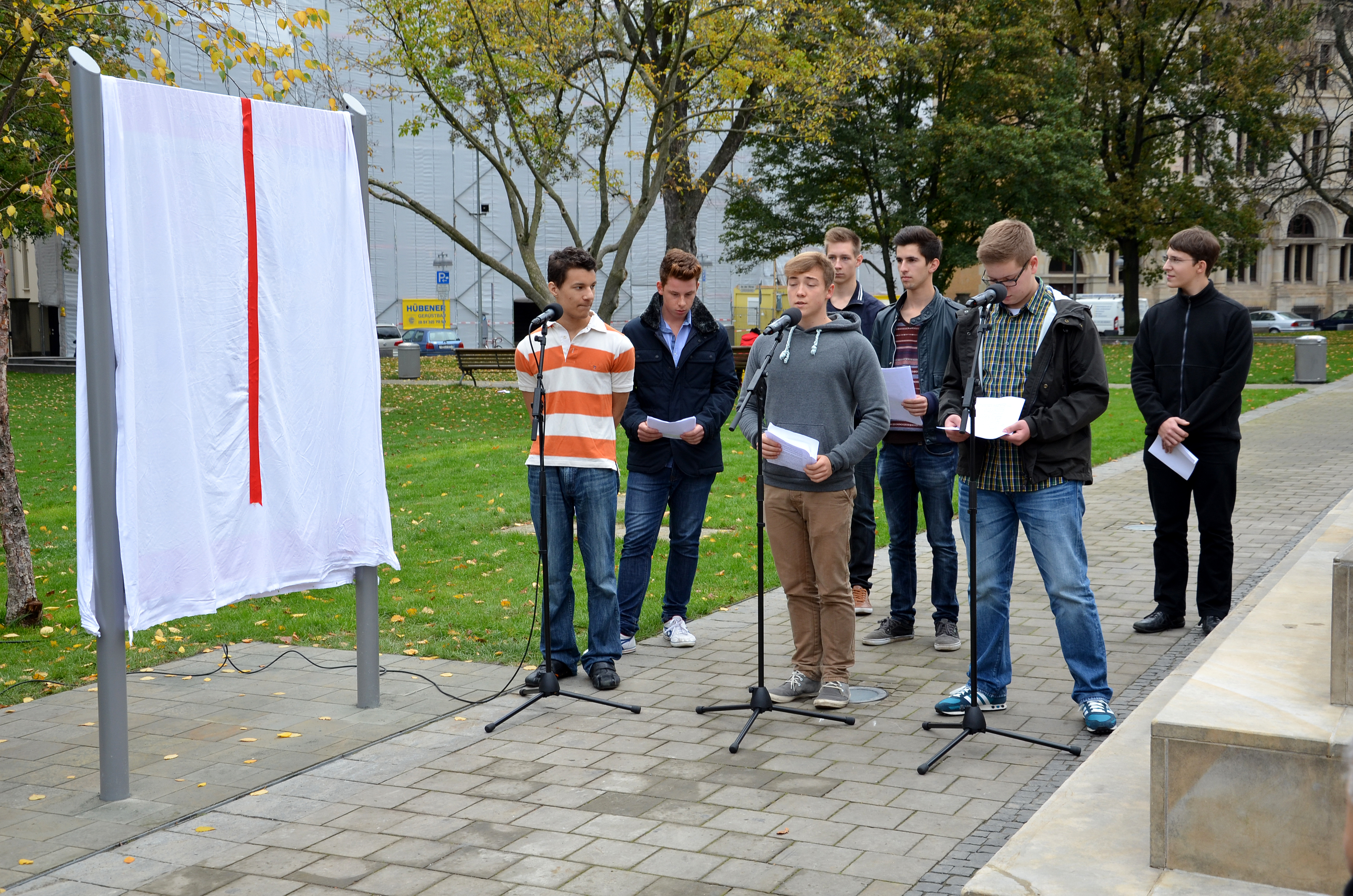 Am 25. Oktober 2013 ab 13.00 Uhr enthüllten Ingrid Wettberg, die Vorsitzende der Liberalen Jüdischen Gemeinde Hannover, gemeinsam mit Hannovers Kultur- und Schuldezernentin Marlis Drevermann, die Informationstafel zum Mahnmal für die ermordeten Juden Hannovers. Begleitet von den Klängen des Musikers Thomas Zander und vorgetragener Inhalte der Tafel durch Schüler der St. Ursula-Schule Hannover nahmen zahlreiche Gäste aus Politik, Kultur und Gesellschaft an der Veranstaltung teil, darunter die Holocaust-Überlebenden Salomon Finkelstein und Henry Korman ...